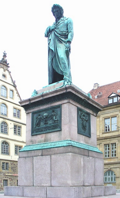 Stuttgart Schillerplatz Schiller von Bertel Thorvaldsen 1839 Selbst fotografiert von user:Enslin at 5 Jan 2006 in Stuttgart